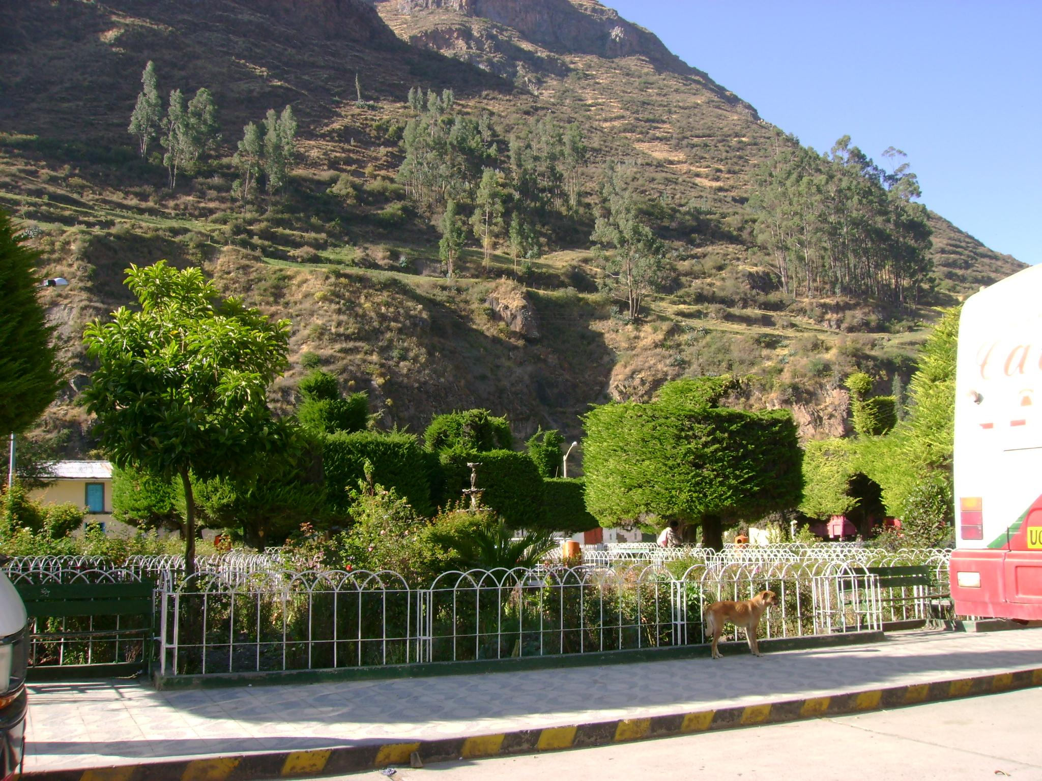 Plaza de Armas.